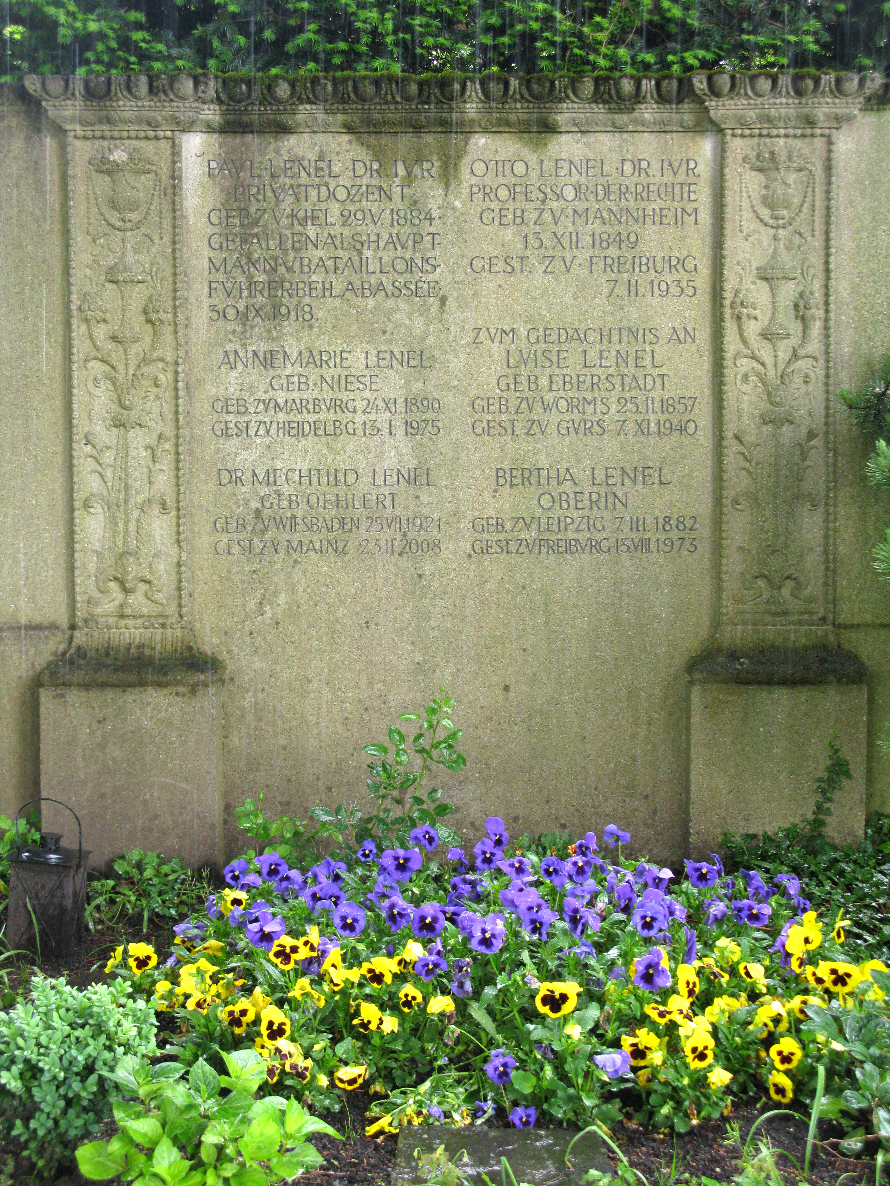 Lenel, Otto, Rechtshistoriker, Grab auf dem Freiburger Hauptfriedhof